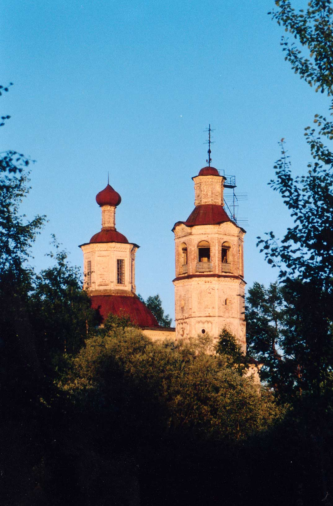 Yarensk Cathedral